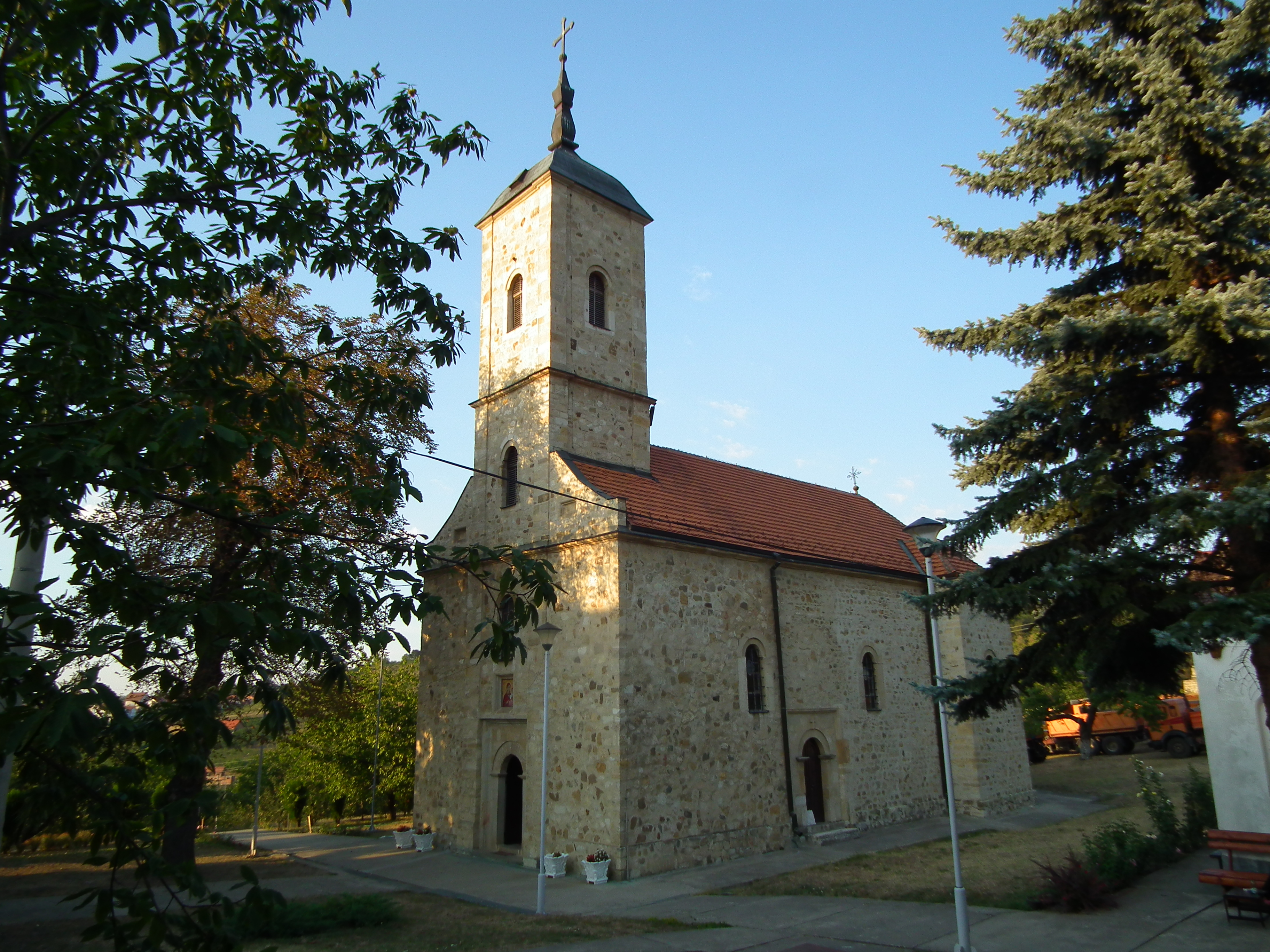 Манастир у близини села Бегаљица,крај Гроцке.